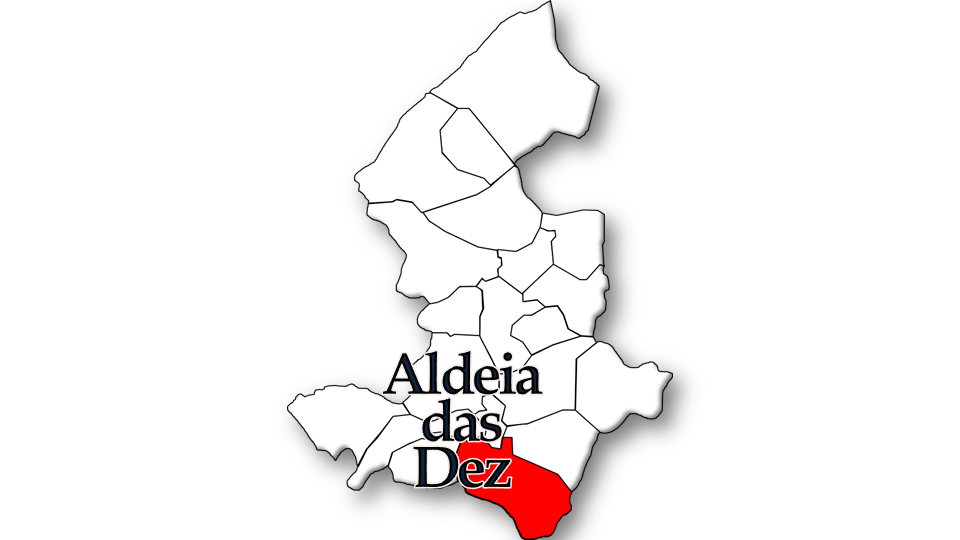 População